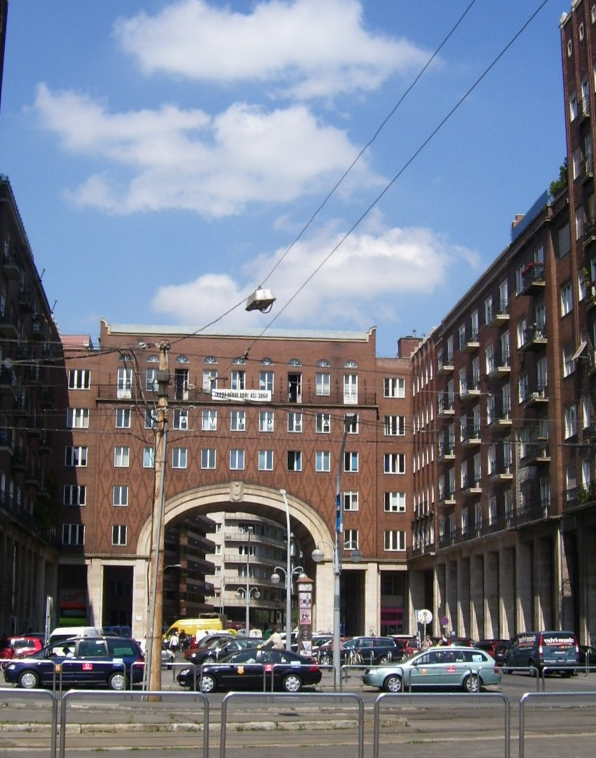 Budapest, VII. Madách téri házak (Eredetileg a Fővárosi Közmunkák Tanácsa székháza). Wälder Gyula, 1937-38